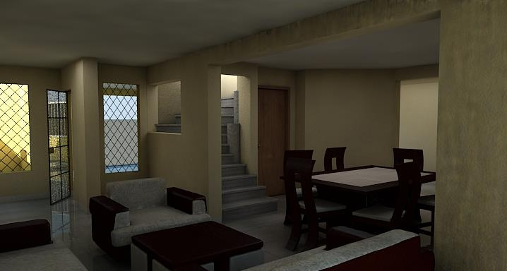 ejemplo de render arquitectonico en V-Ray